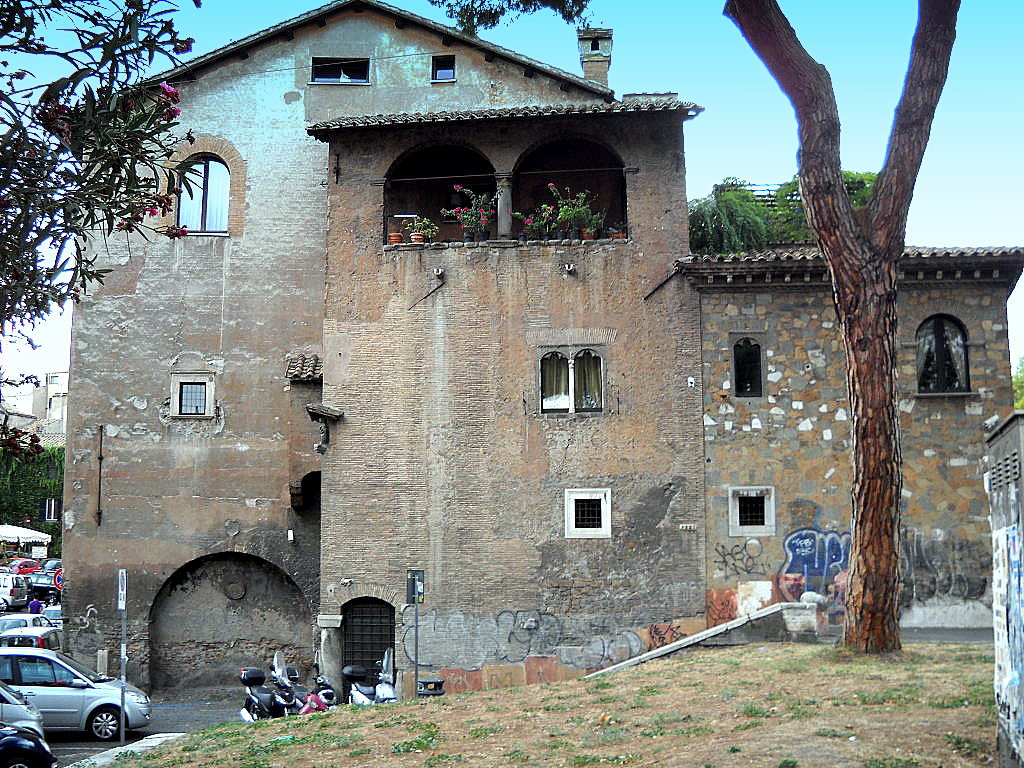 Case Mattei in piazza in Piscinula. Roma, rione Trastevere